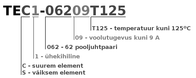 Standardne Peltier' elementide märgistus.